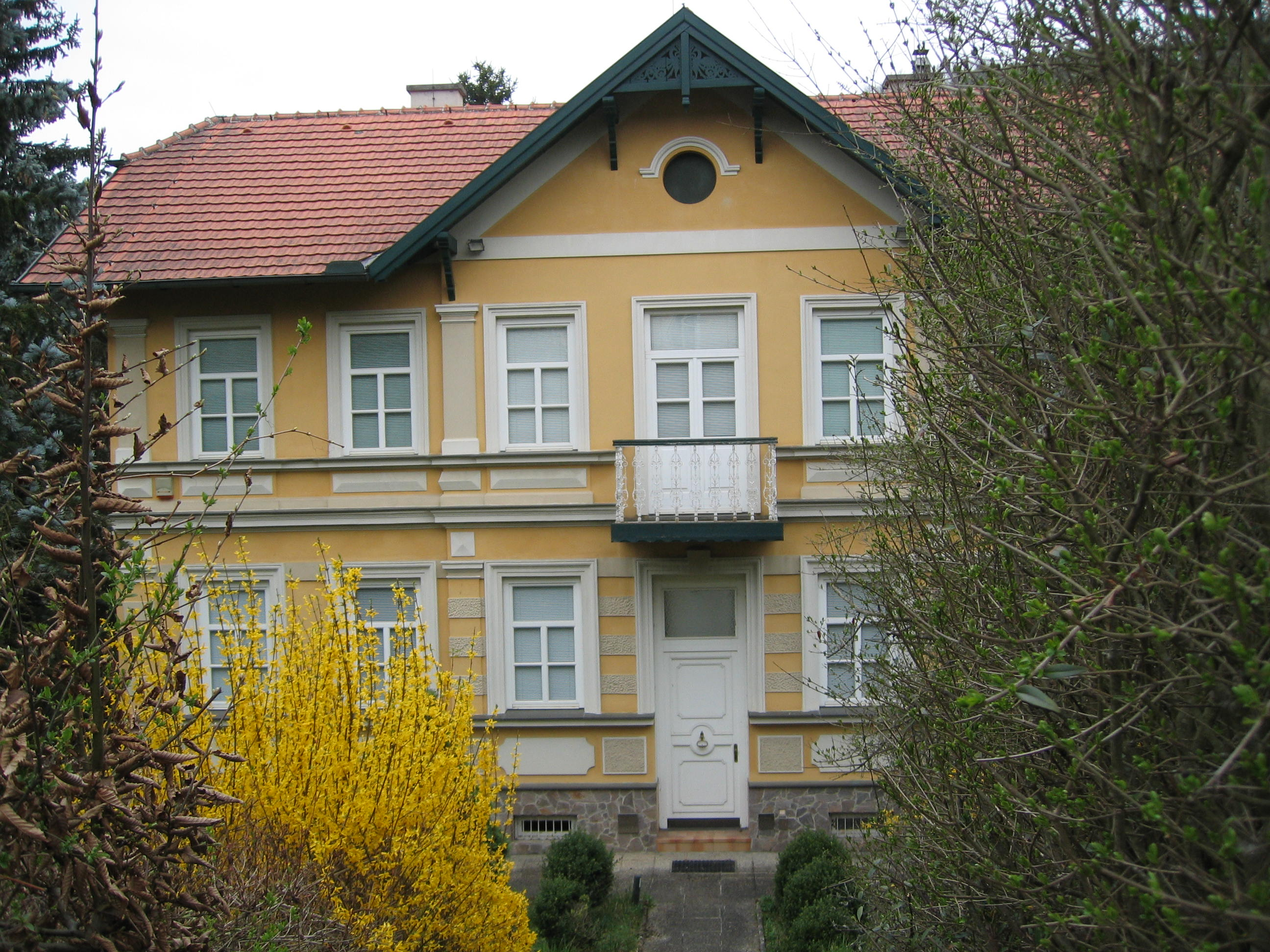 Falcos Villa in Gars am Kamp, Horner Straße 214. Sie befindet sich direkt neben der Villa von Fritz Langs Eltern, auf dessen Film M - Eine Stadt sucht einen Mörder in Falcos Jeanny-Videoclip angespielt wird.